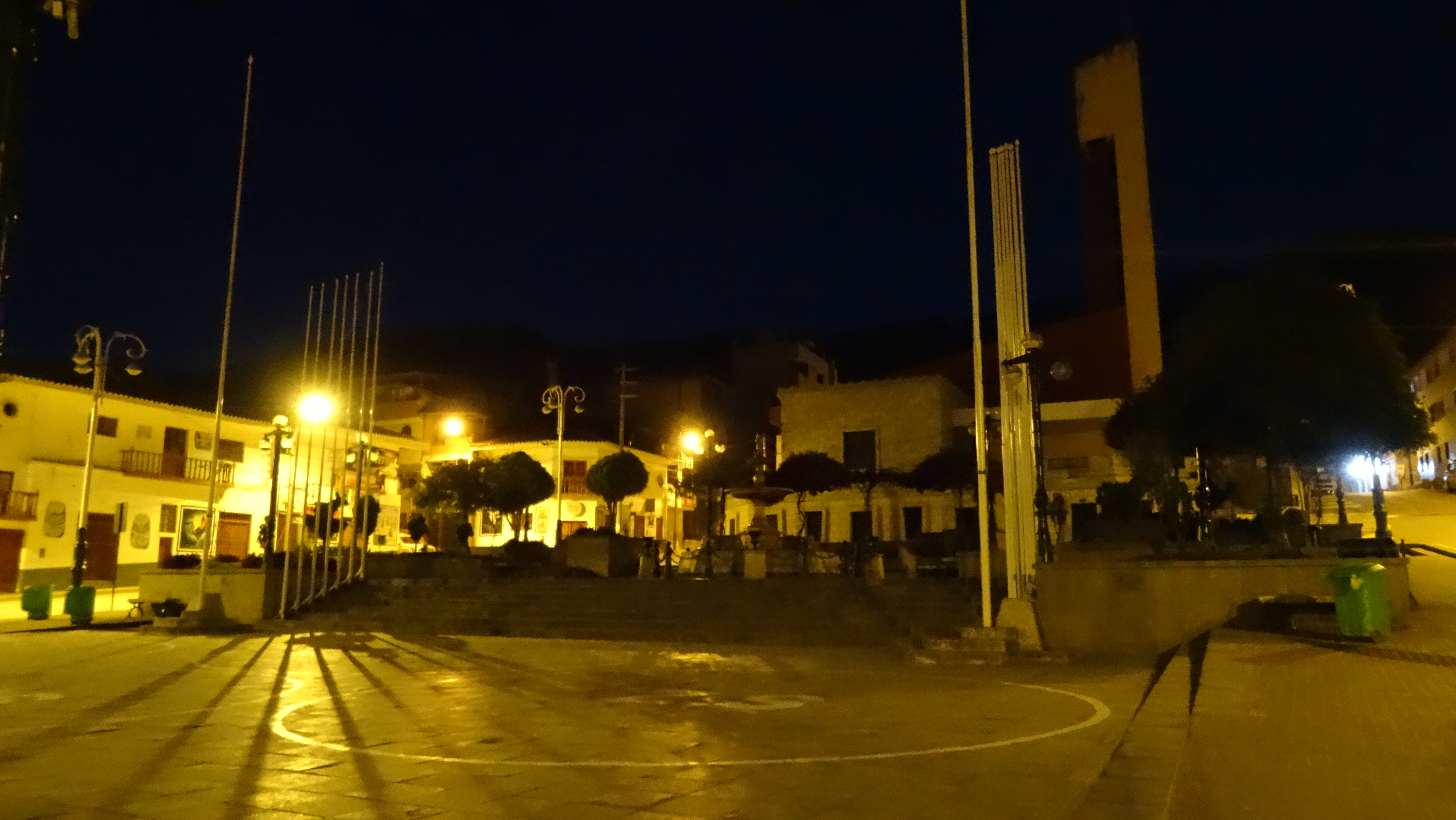 Plaza de Armas de Huari en horas de la madrugada.